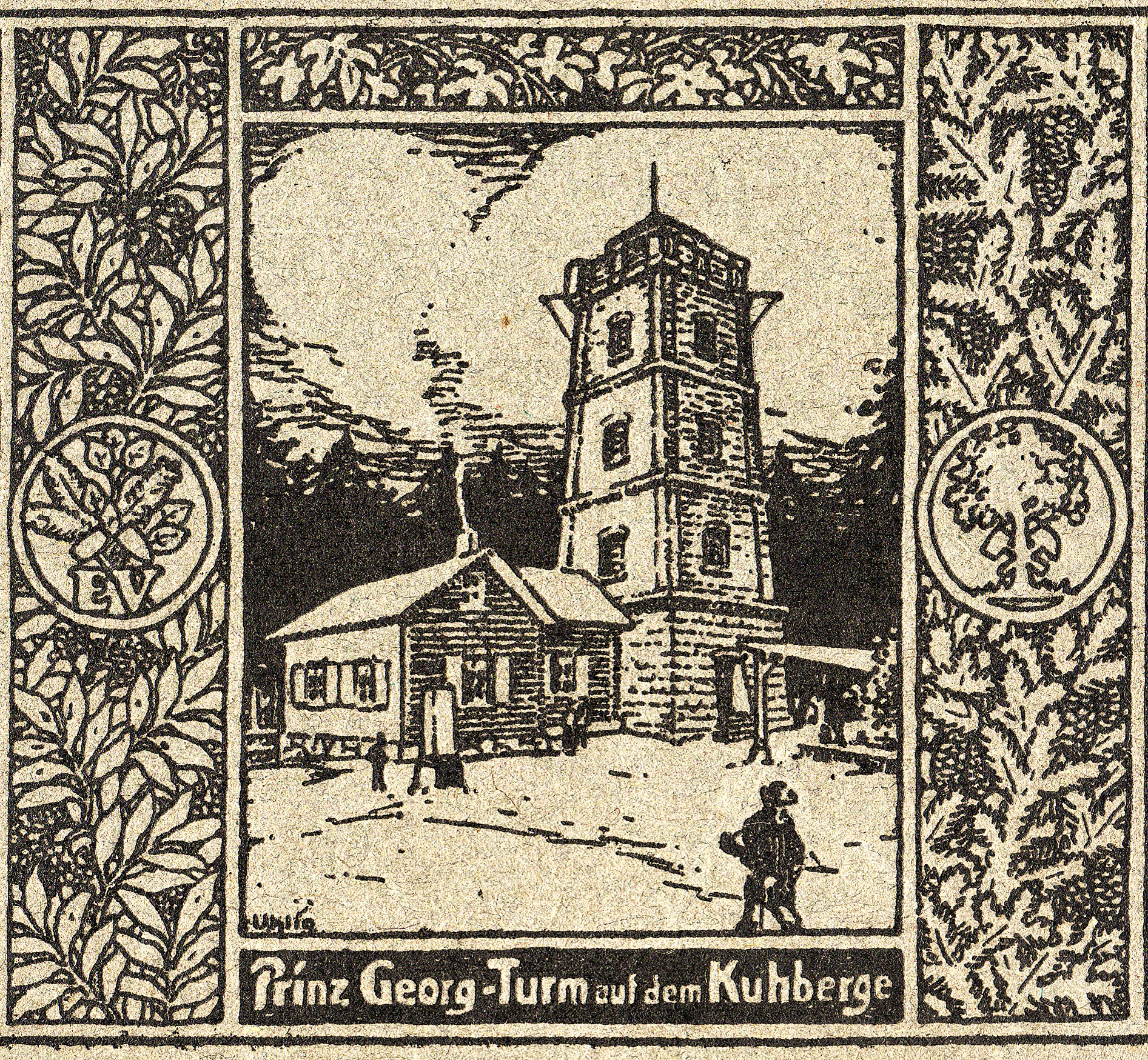 Kuhberg (Stützengrün), Teil der Titelseite von: Max Grohmann: Auf nach Schönheide mit Bismarckhain und Prinz-Georg-Turm auf dem Kuhberge. Ratgeber in Bild und Wort für Einheimische, für Sommerfrischler, Wanderlustige und Wintersportfreunde, für Schul-, Vereins- und Gesellschaftsausflügler. Herausgegeben im Auftrag des Erzgebirgs-Zweigvereins Schönheide von M. Grohmann, gedruckt bei Meisenbach, Riffahrt und Co., Leipzig o. J. (um 1915)Vor dem Blockhaus steht die trigonometrische Säule aus dem Jahr 1876. Beides, Blockhaus und Vermessungssäule, sind im Jahr 2017 noch vorhanden.